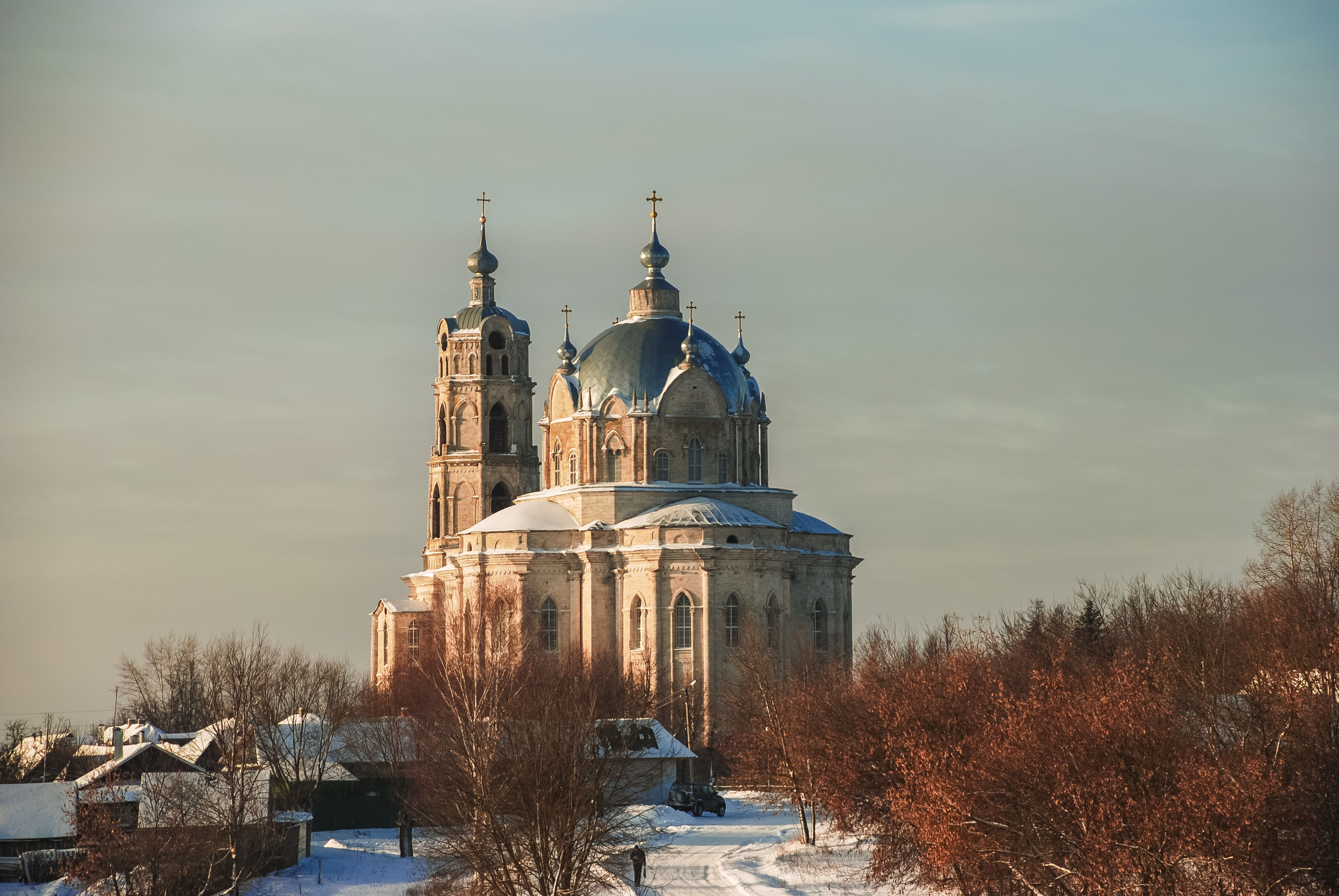 Церковь Пресвятой Троицы: Гусь-Железный, Касимовский район, Рязанская область